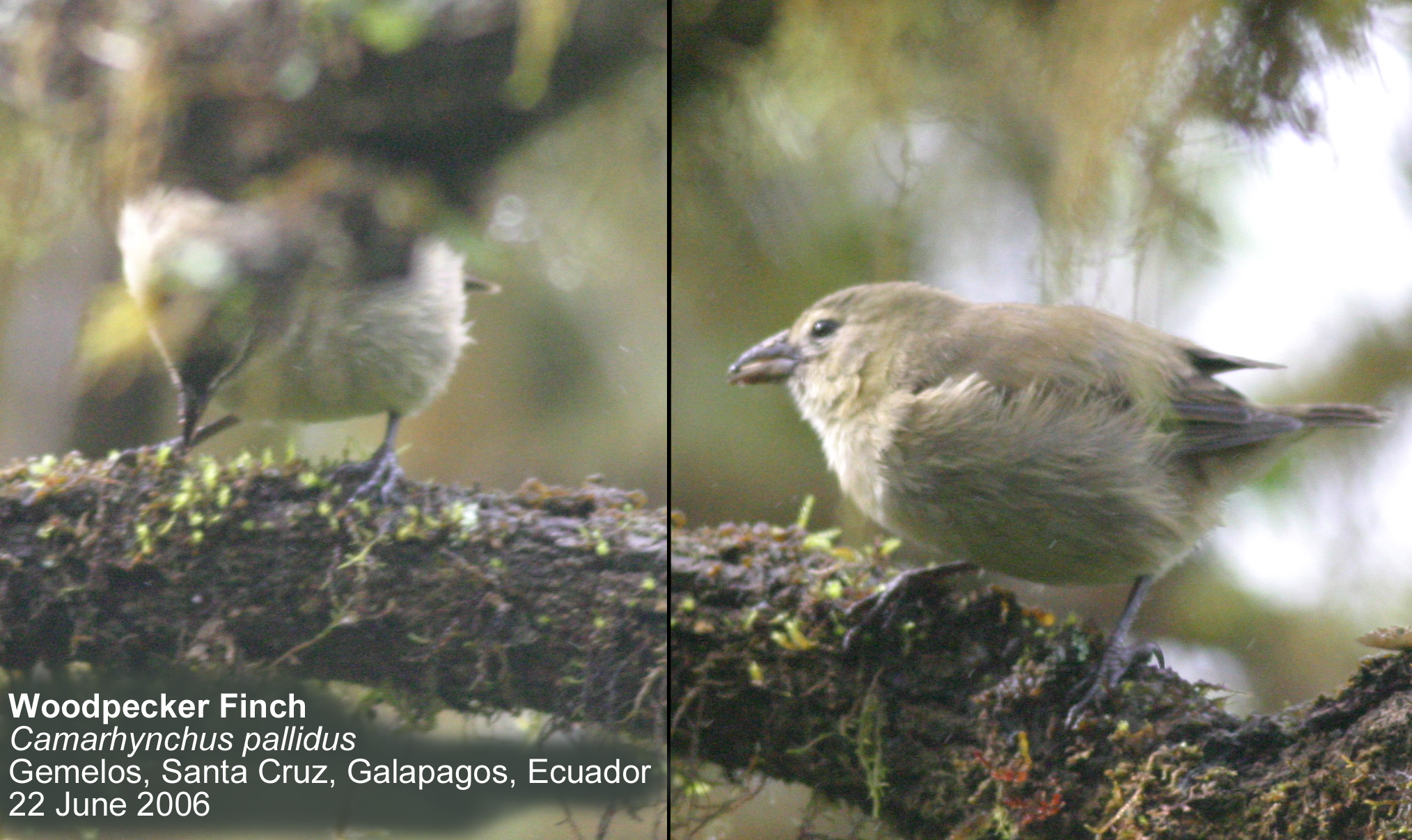 Darwin's Finch Camarhynchus pallidus